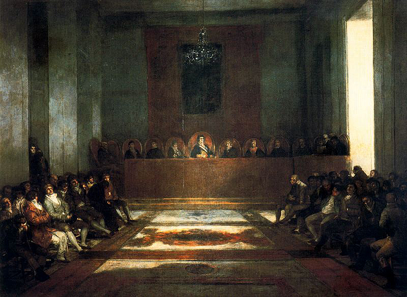 La Junta de Filipinas